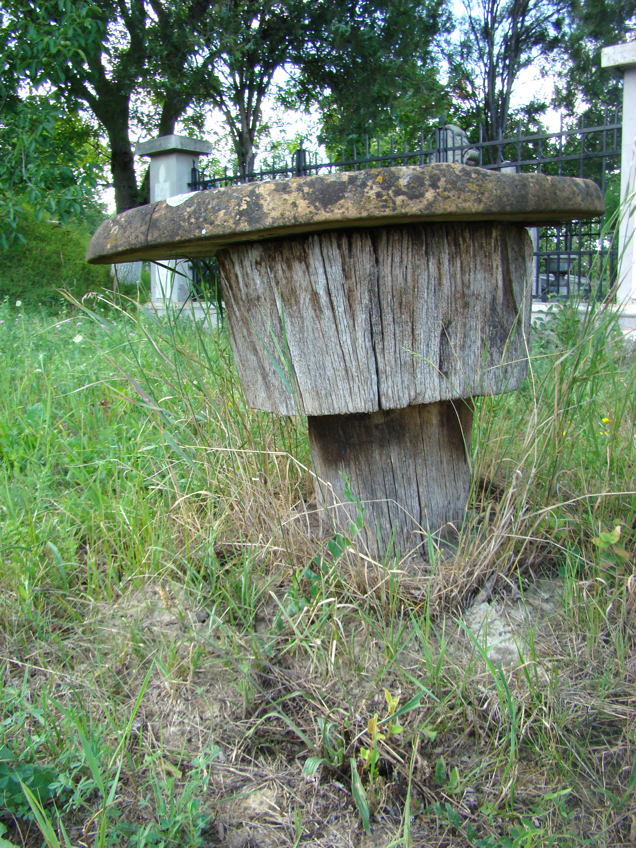 Biserica ortodoxă din Miceştii de Câmpie, cu hramul “Sfinţii Arhangheli Mihail şi Gavriil”